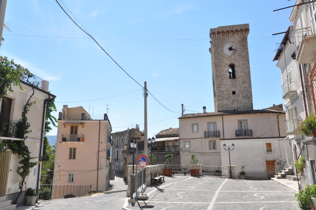 Cocullo 2012